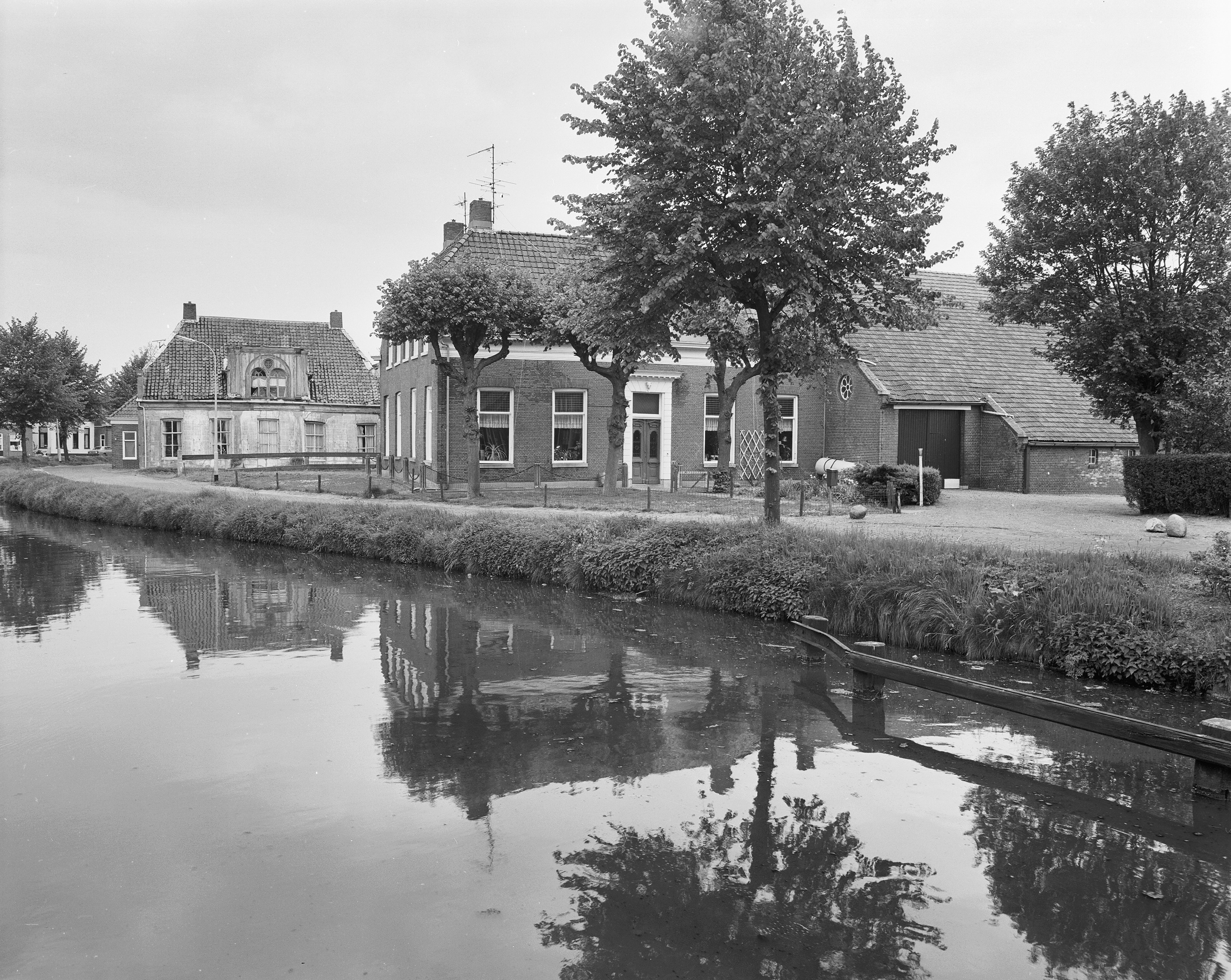 Woonhuis - Schuur: rechterzijgevel